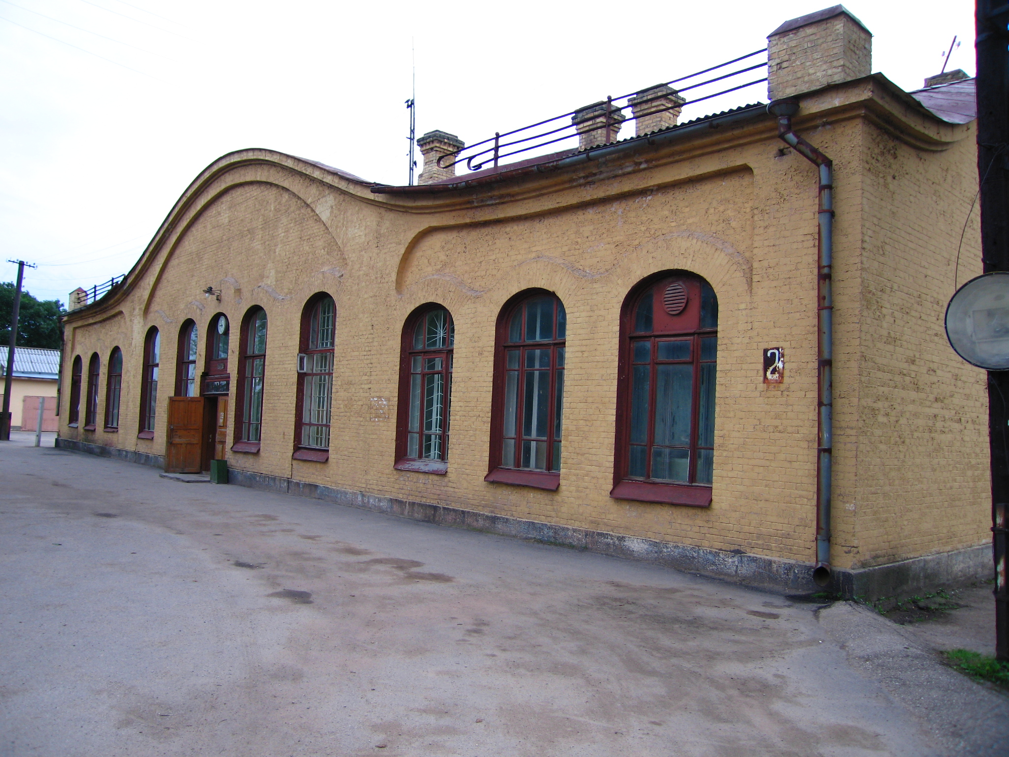 Abrene, dzelzceļa stacija